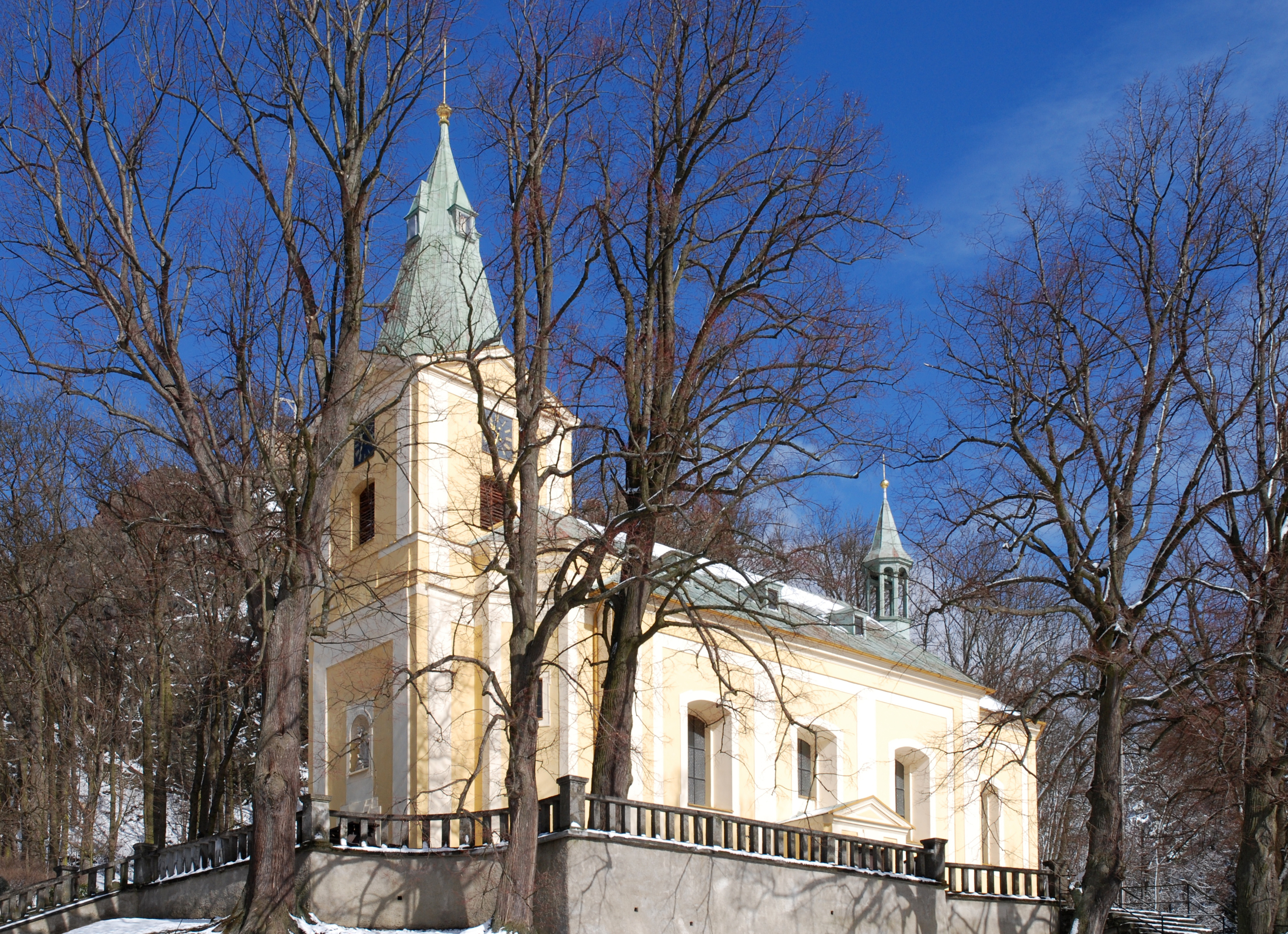 Andělská Hora, kostel Zjevení svatého Michaela archanděla, pohled od jihozápadu